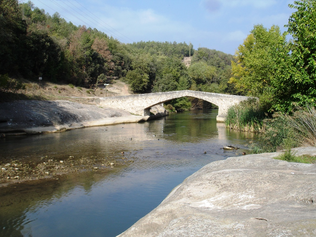 Pont nou d'Orniu, a Cal Rosal, Avià